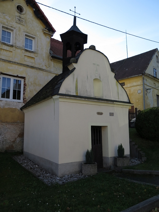 Kaplička, Mostice.